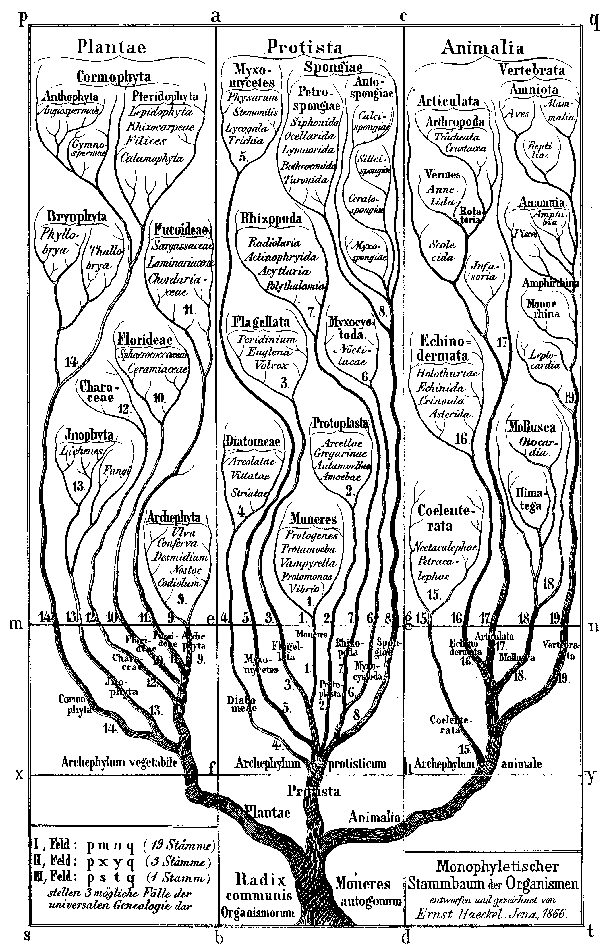 Árbol de la vida según Haeckel, E. H. P. A. (1866).Generelle Morphologie der Organismen : allgemeine Grundzüge der organischen Formen-Wissenschaft, mechanisch begründet durch die von C. Darwin reformirte Decendenz-Theorie. Berlin.